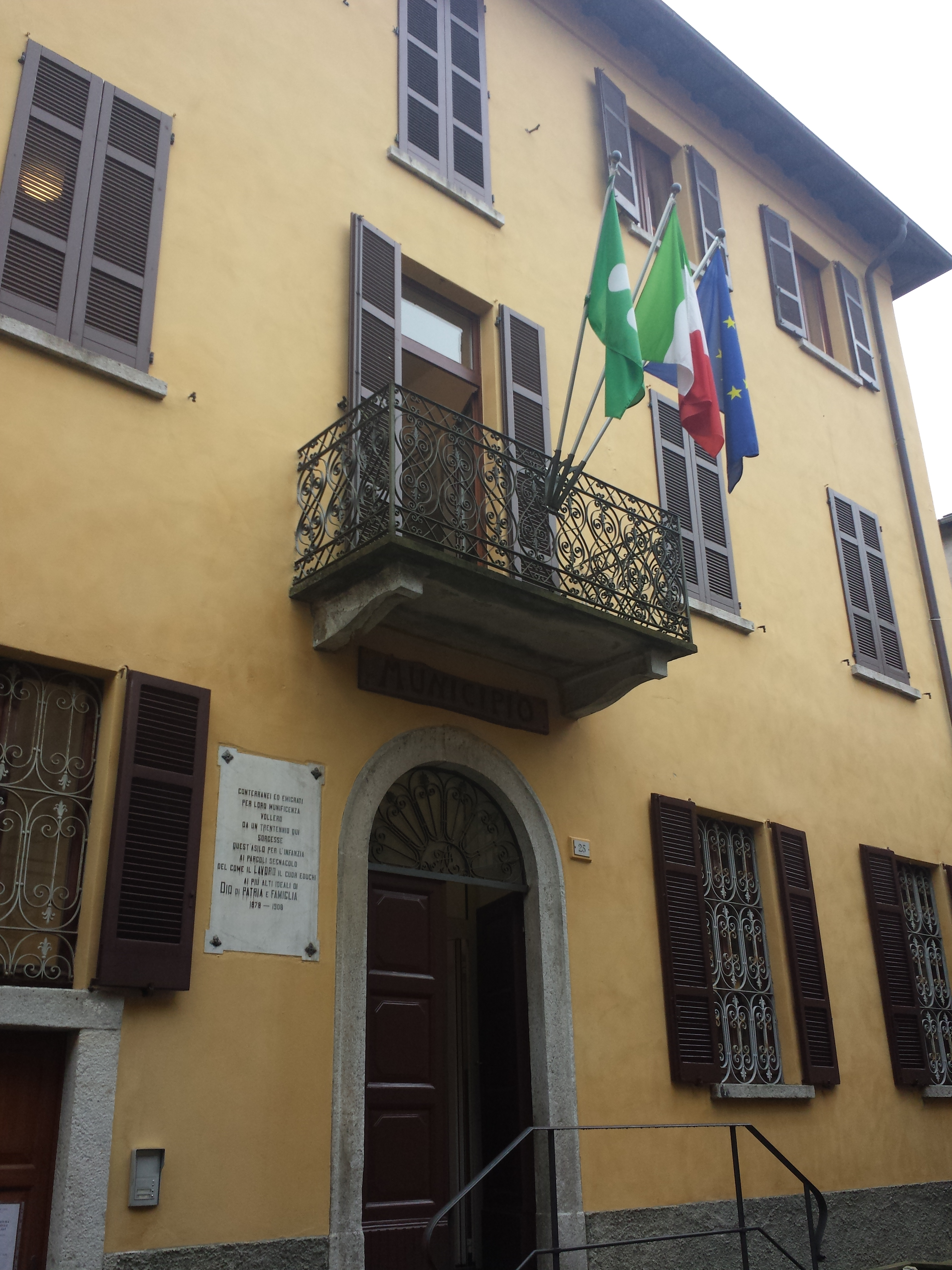 Palazzo municipale This is a photo of a monument which is part of cultural heritage of Italy.